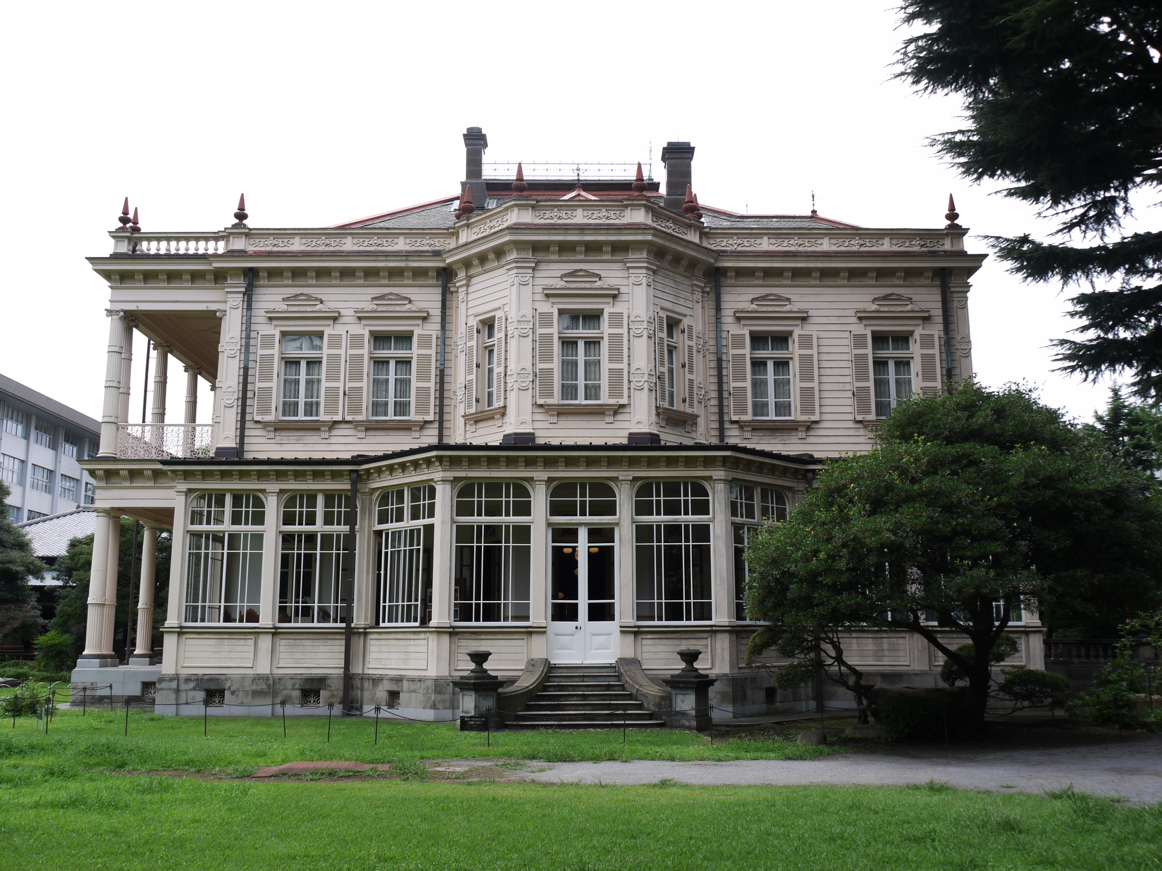 旧岩崎邸 東側の様子